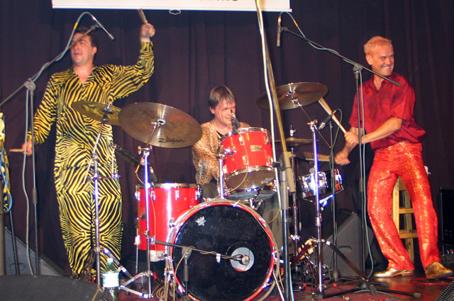 Концерт Red Elvises в клубе Б-2